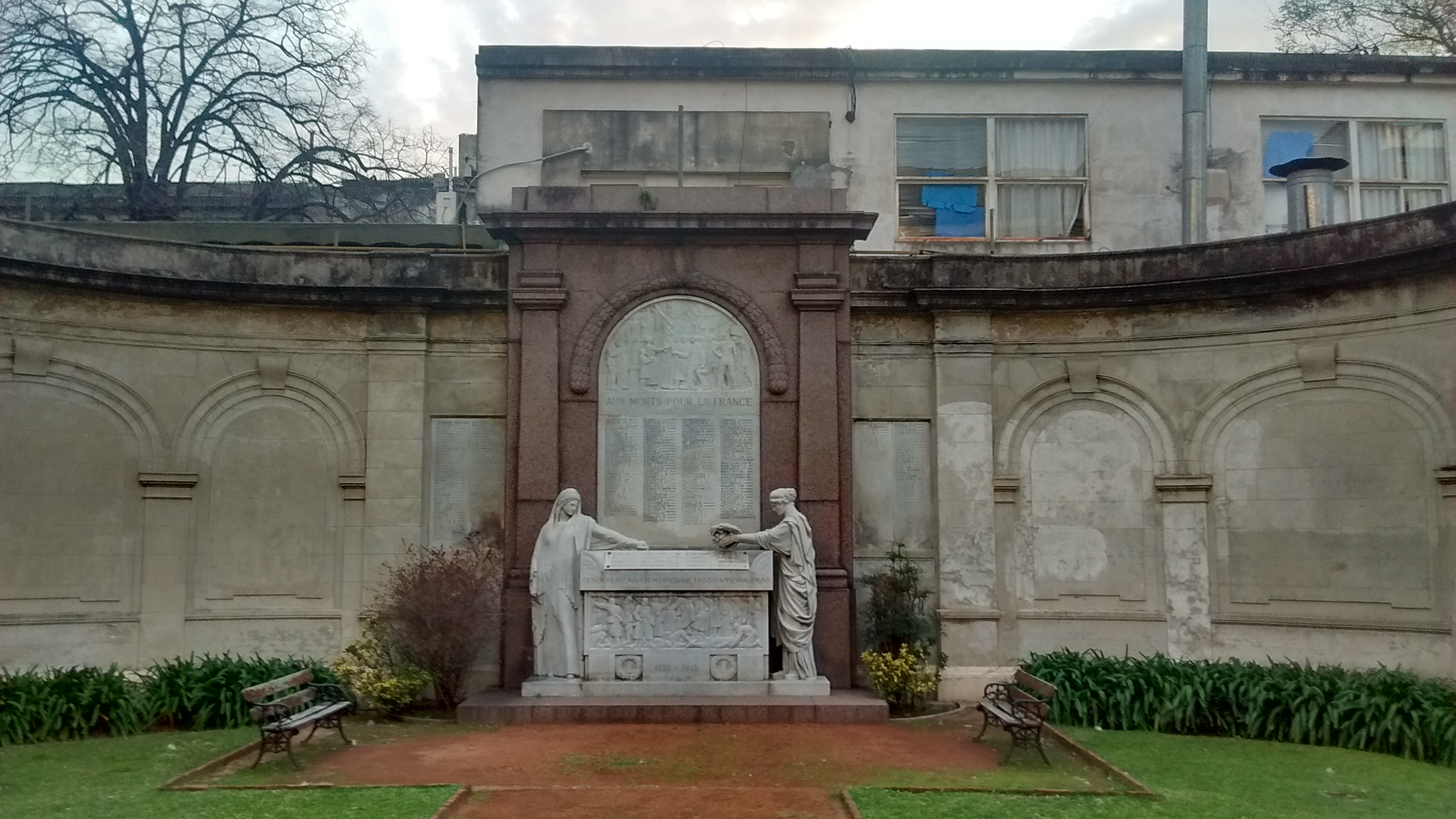 Monumentos en el patio del Hospital Francés de 1923 que recordaba a los franceses caídos durante la Primera Guerra Mundial. Con el tiempo se agregaron los nombres de los caídos en la Segunda Guerra Mundial (1939-1945). Buenos Aires, Argentina.